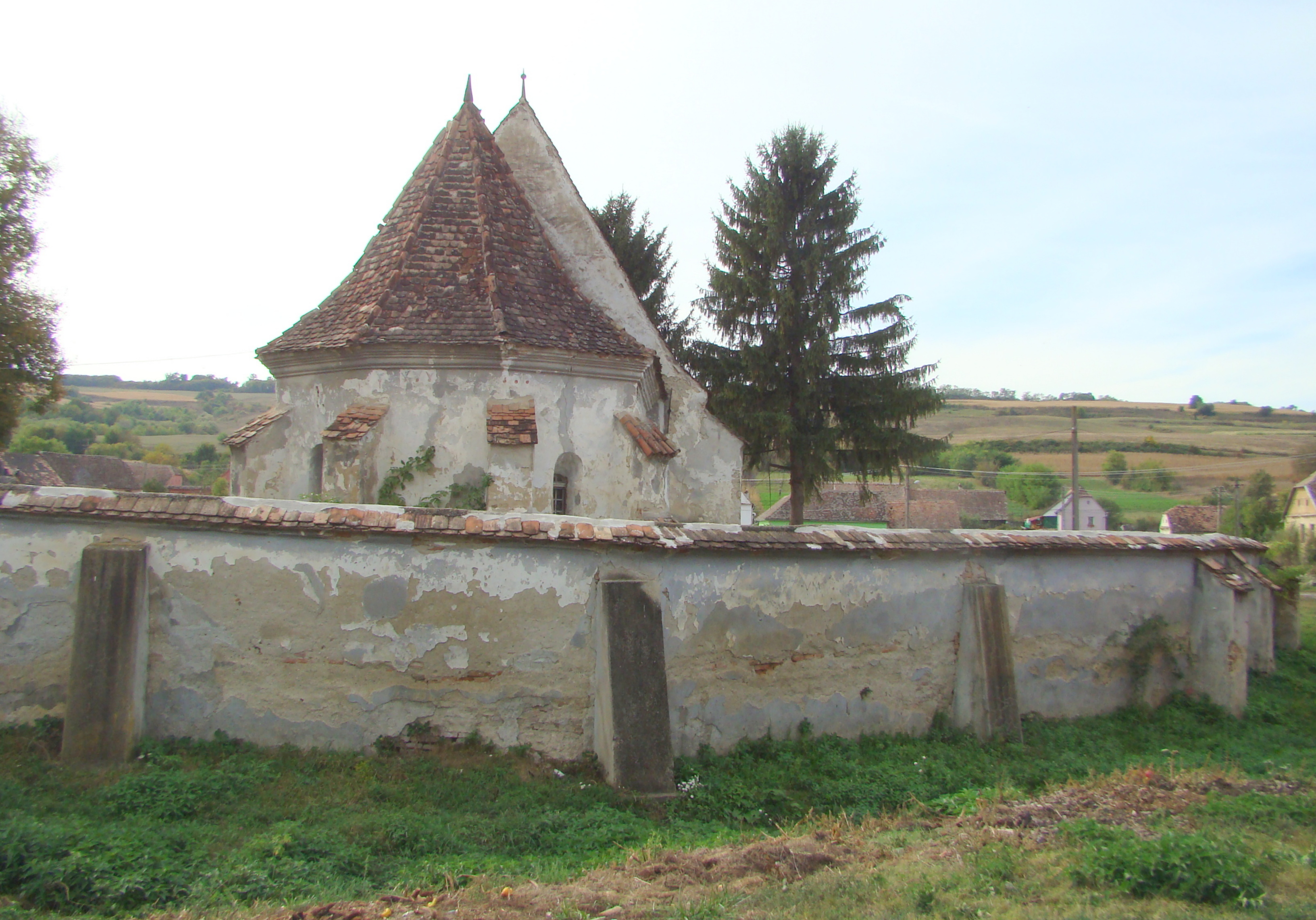 Ansamblul bisericii evanghelice, sat Ormeniș; comuna Viișoara Str. Principală 204 sec. XVI - XVIII